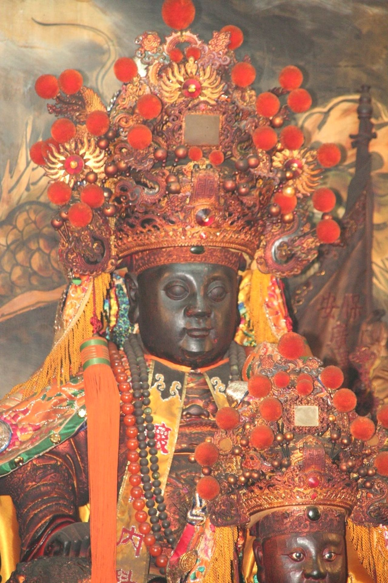 廣澤尊王又稱「保安尊王」、「保安廣澤尊王」，俗稱「郭相公」、「郭聖公」、「郭聖王」、「翹腳王」、「聖王公」等。